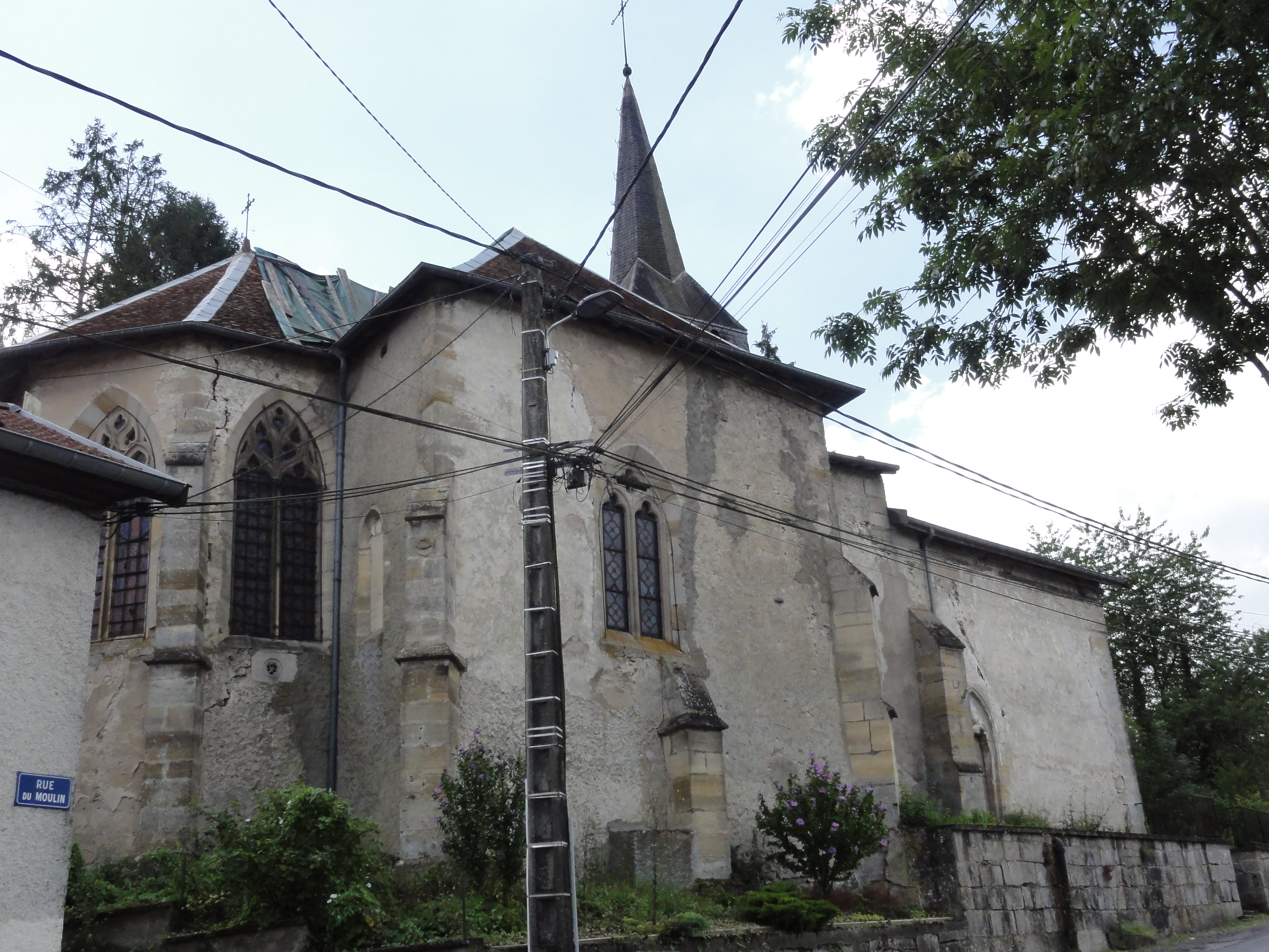 Naives-Rosières (Meuse) Rosières, église